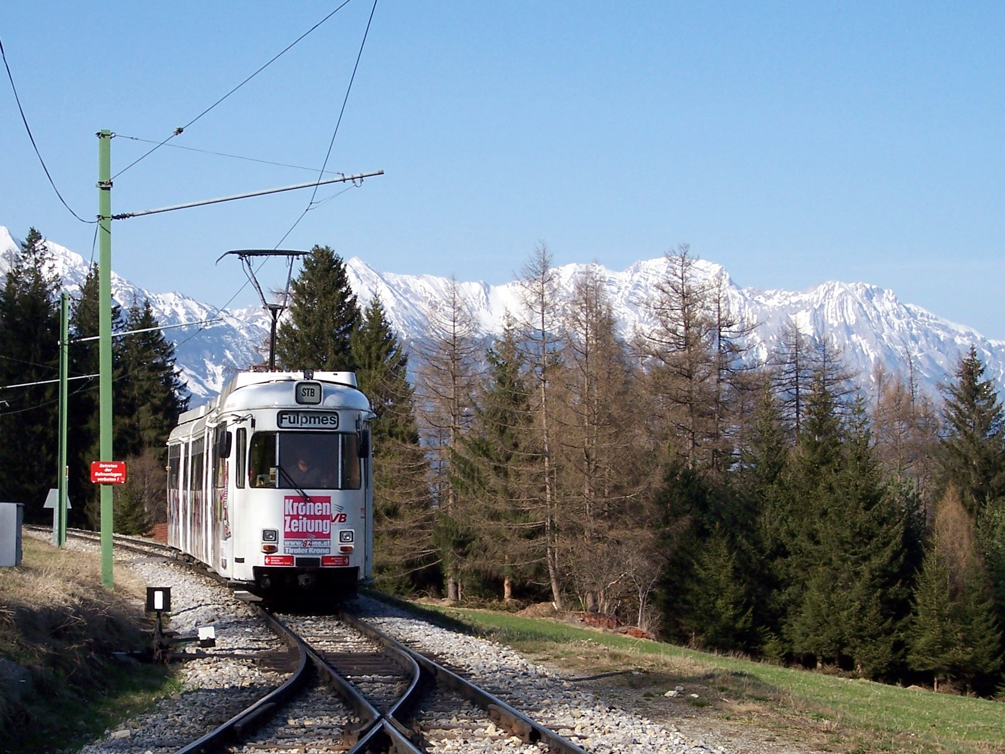 Stubaitalbahn fährt taleinwärts in Bahnhof Telfer Wiesen ein